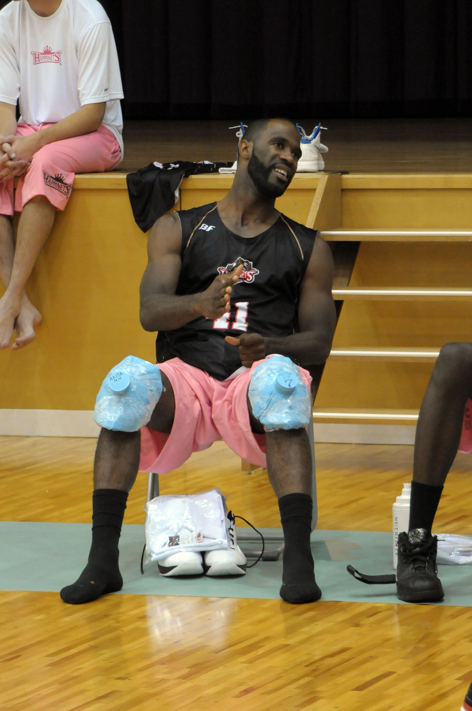 秋田ノーザンハピネッツ、ルーベン・ボイキン選手。琴丘総合体育館で。